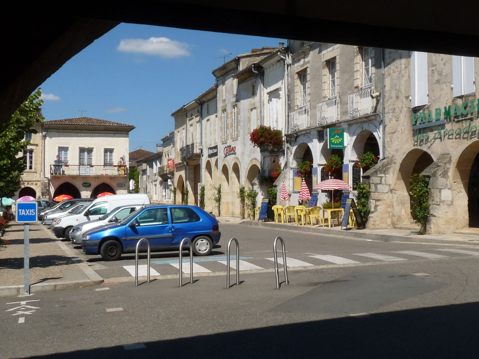 place de Sauveterre-de-Guyenne, Gironde, France